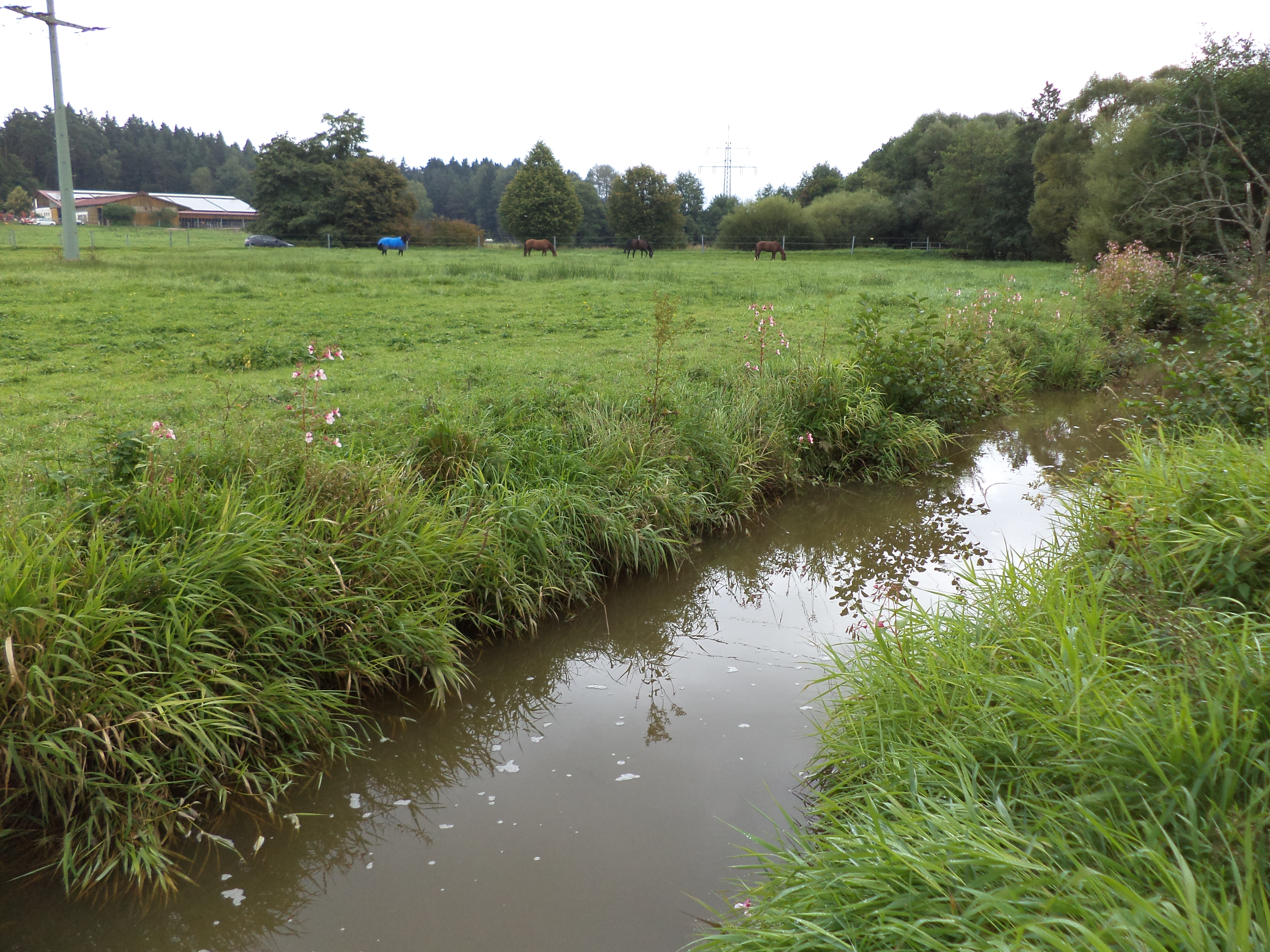 Der Zipser Mühlbach an der Haidmühle